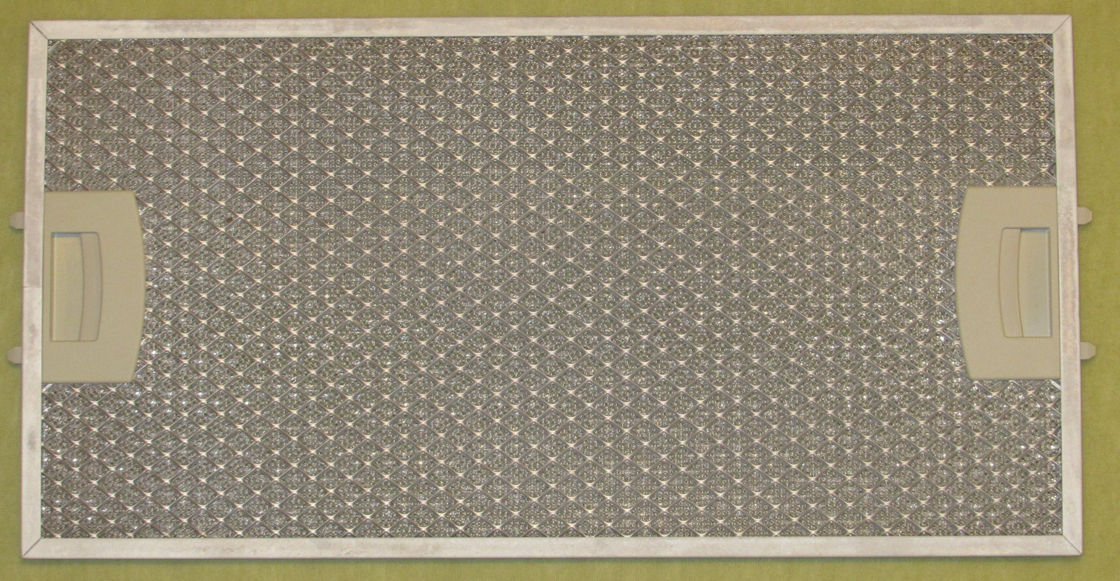 Beispiel für einen Filter einer Dunstabzugshaube - Fettfilter aus Metall